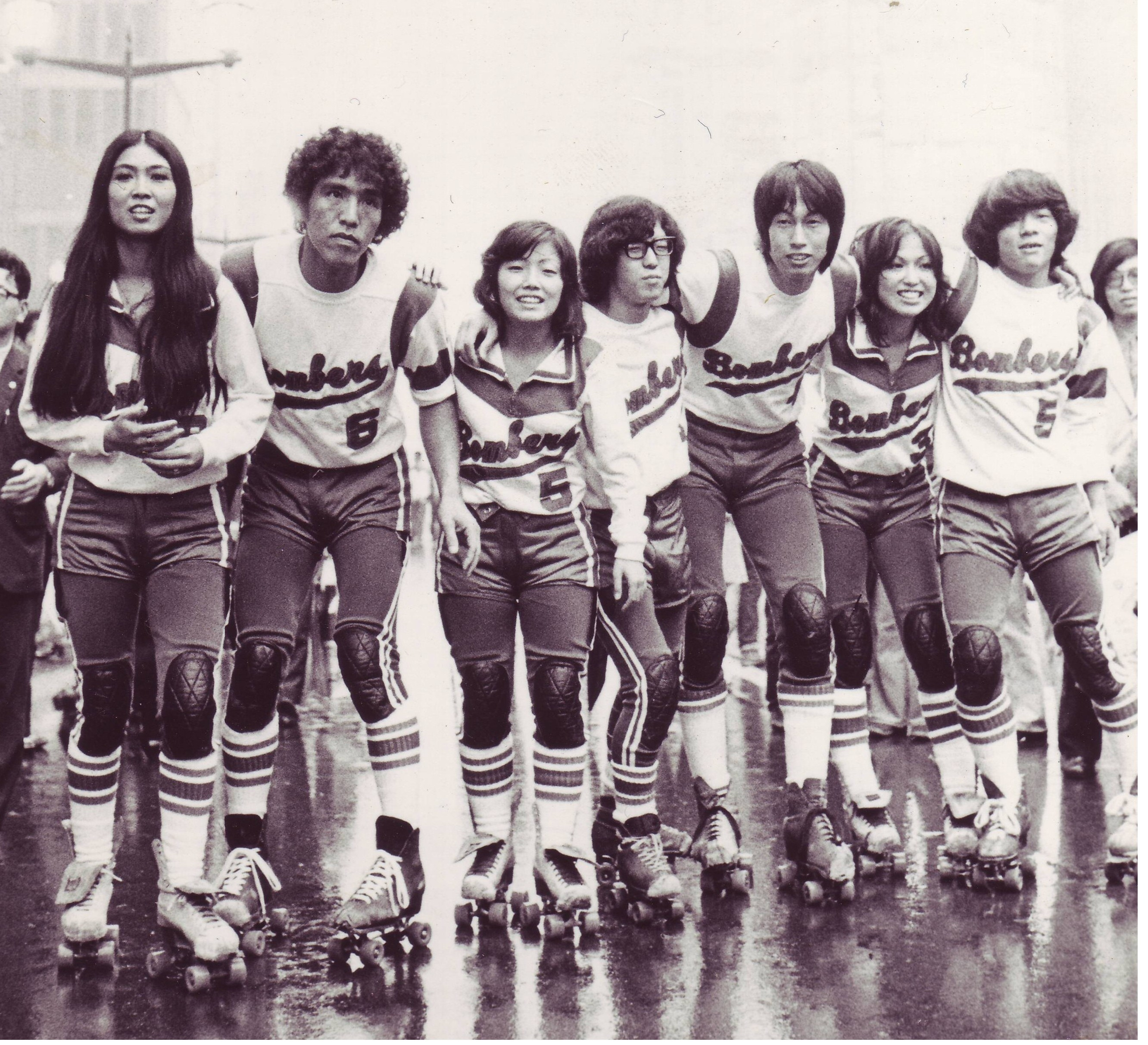 東京ボンバーズ銀座ほこ天にて